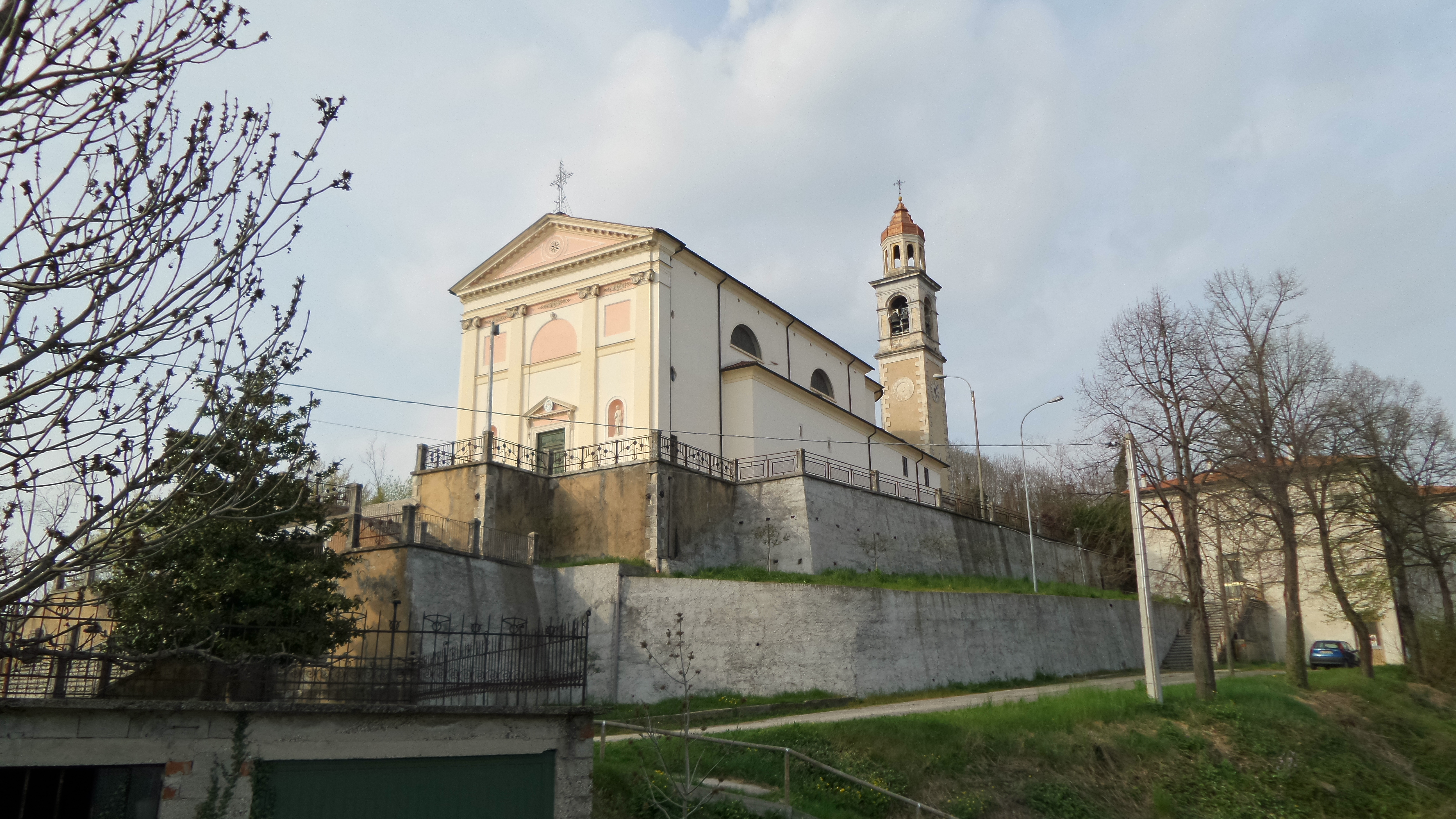 Vista sulla chiesa dei santi Lorenzo e Lucia di Quargnenta di Brogliano dal basso